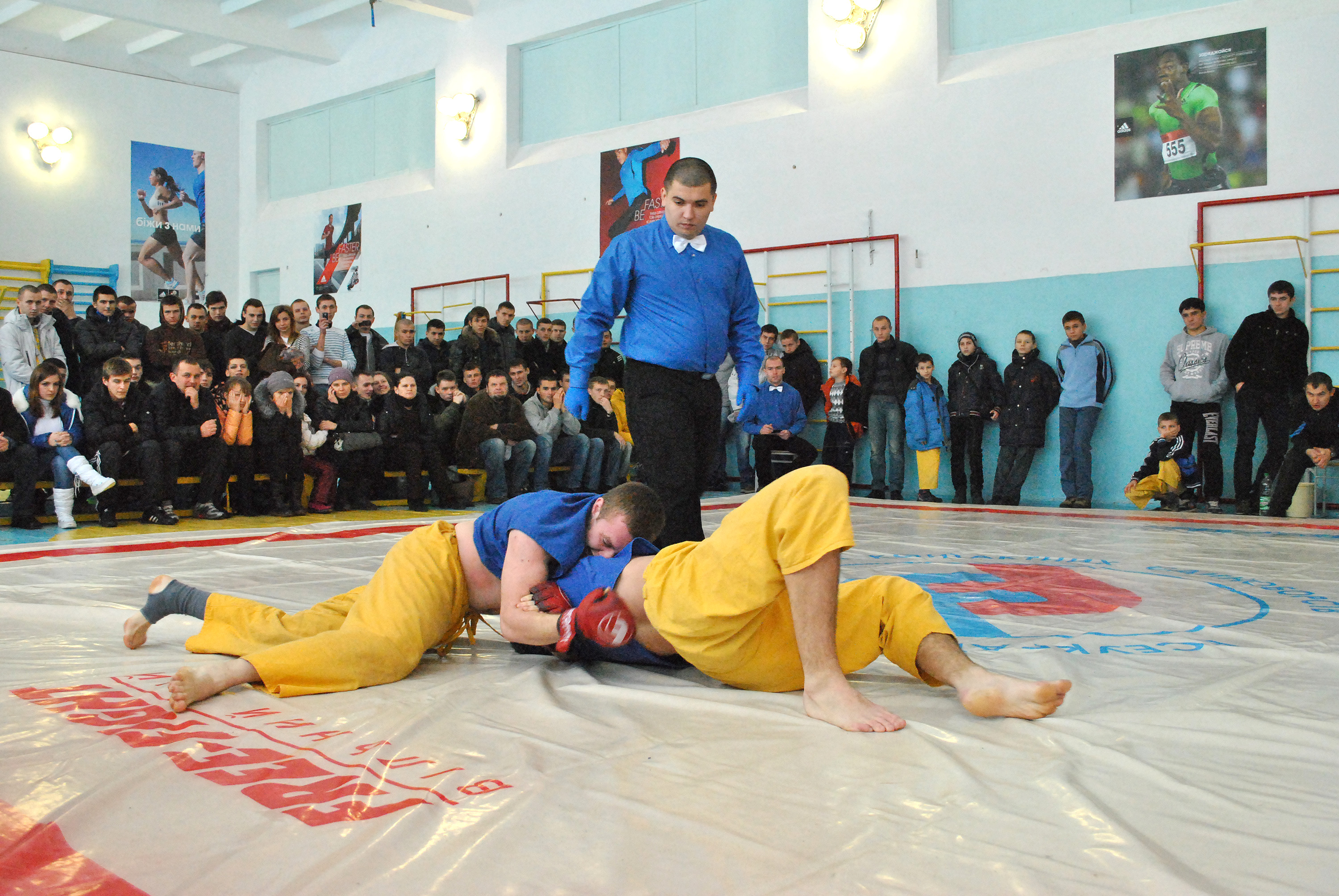 Змагання із фрі-файту в Тернополі у грудні 2012 року, спортивний клуб «Характерник».